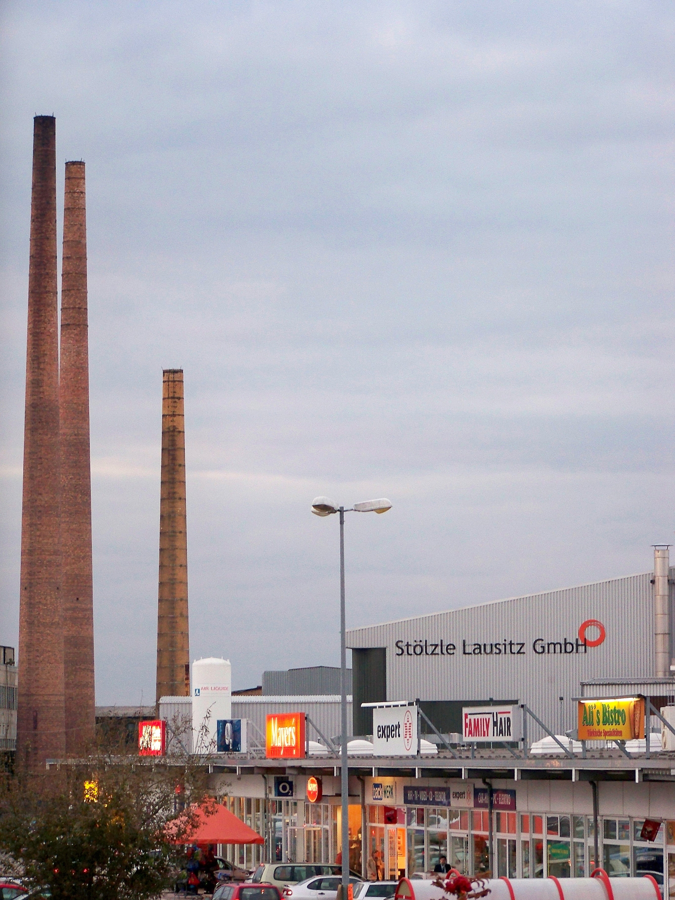 Glasherstellung von Stölzle Lausitz in Weißwasser/Oberlausitz